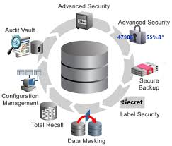 Монгол: Зураг 2. Өгөгдлийн сан